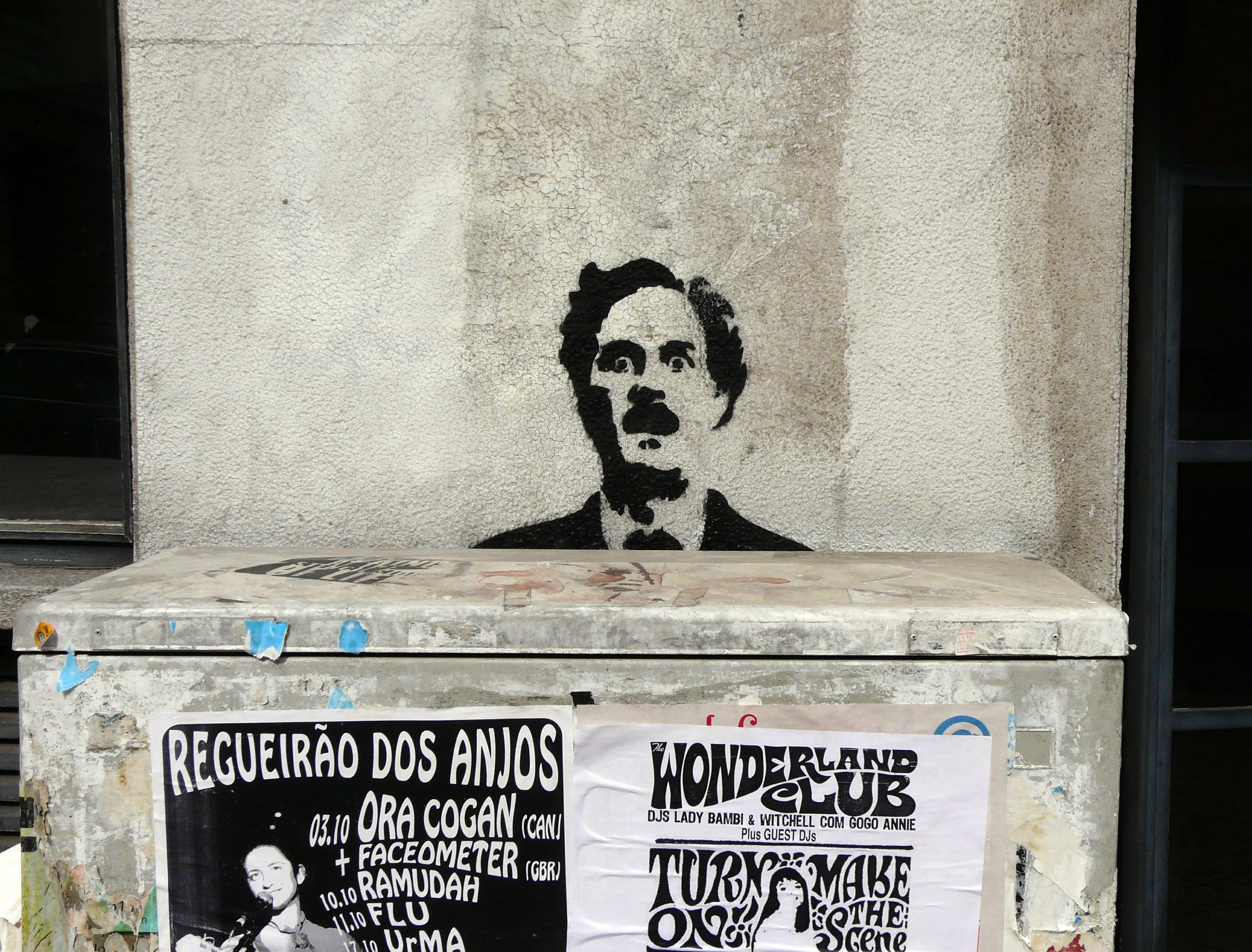 Graffiti de John Cleese en Lisboa.